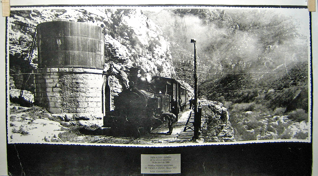 Foto original d'una foto per en Crespo Colomer del darrer viatge del tren Alcoi-Gandia, al 1969. Foto feta a Alcoi. He inclòs l'autoria de la foto al peu de la imatge.